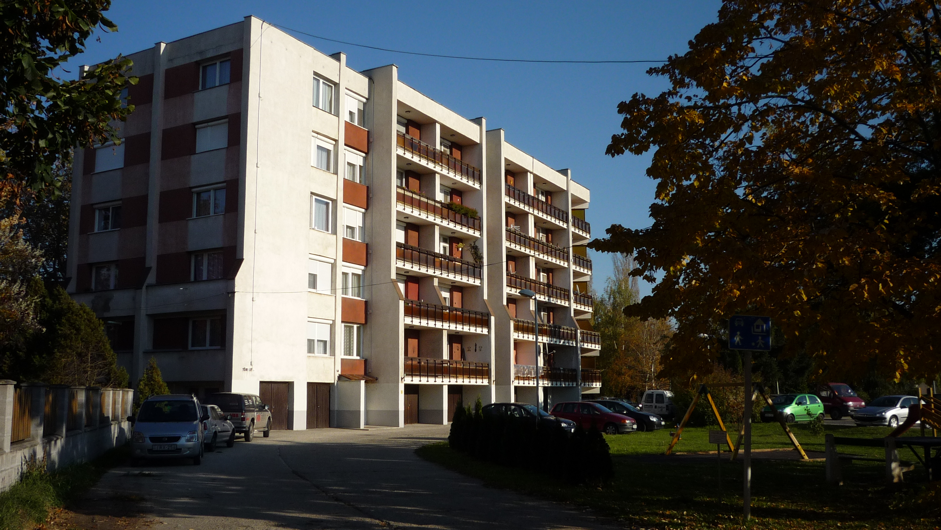 Újkifli - Kapuvár